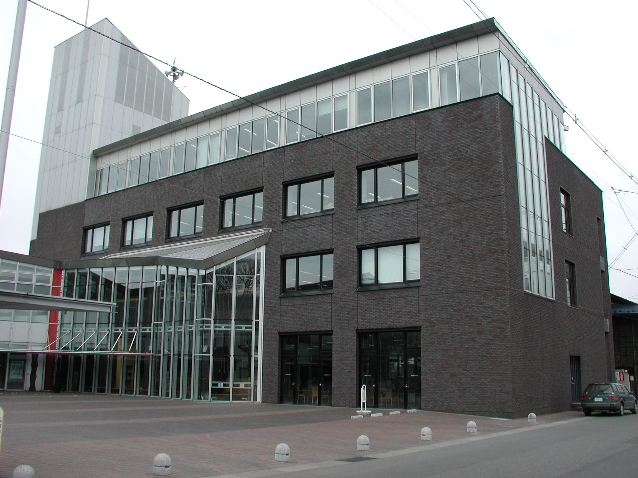 三戸町役場 庁舎